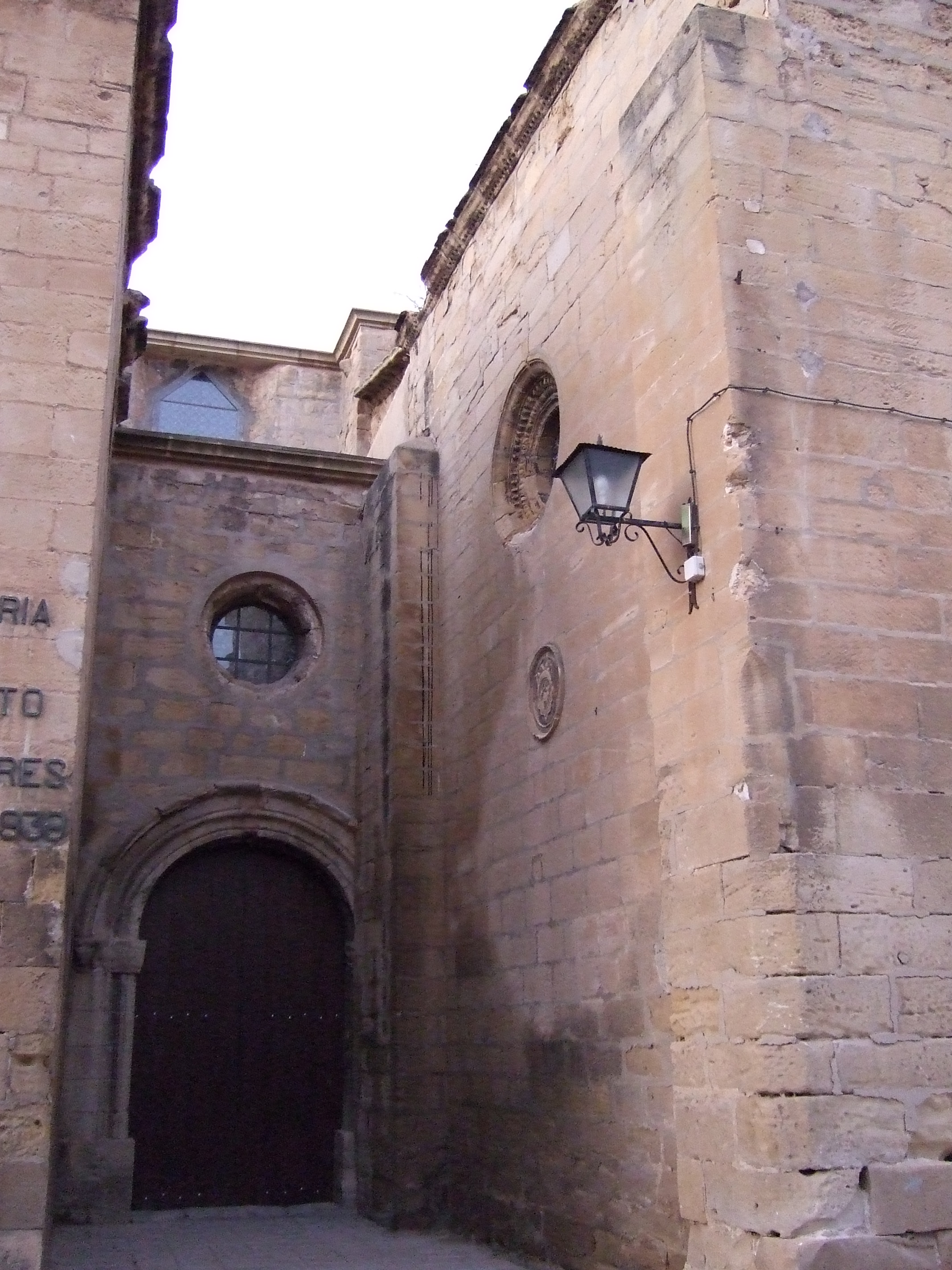 Caspe - Colegiata de Sta María la Mayor siglos XII al XVIII; estilo Gotico - Puerta lateral dcha.